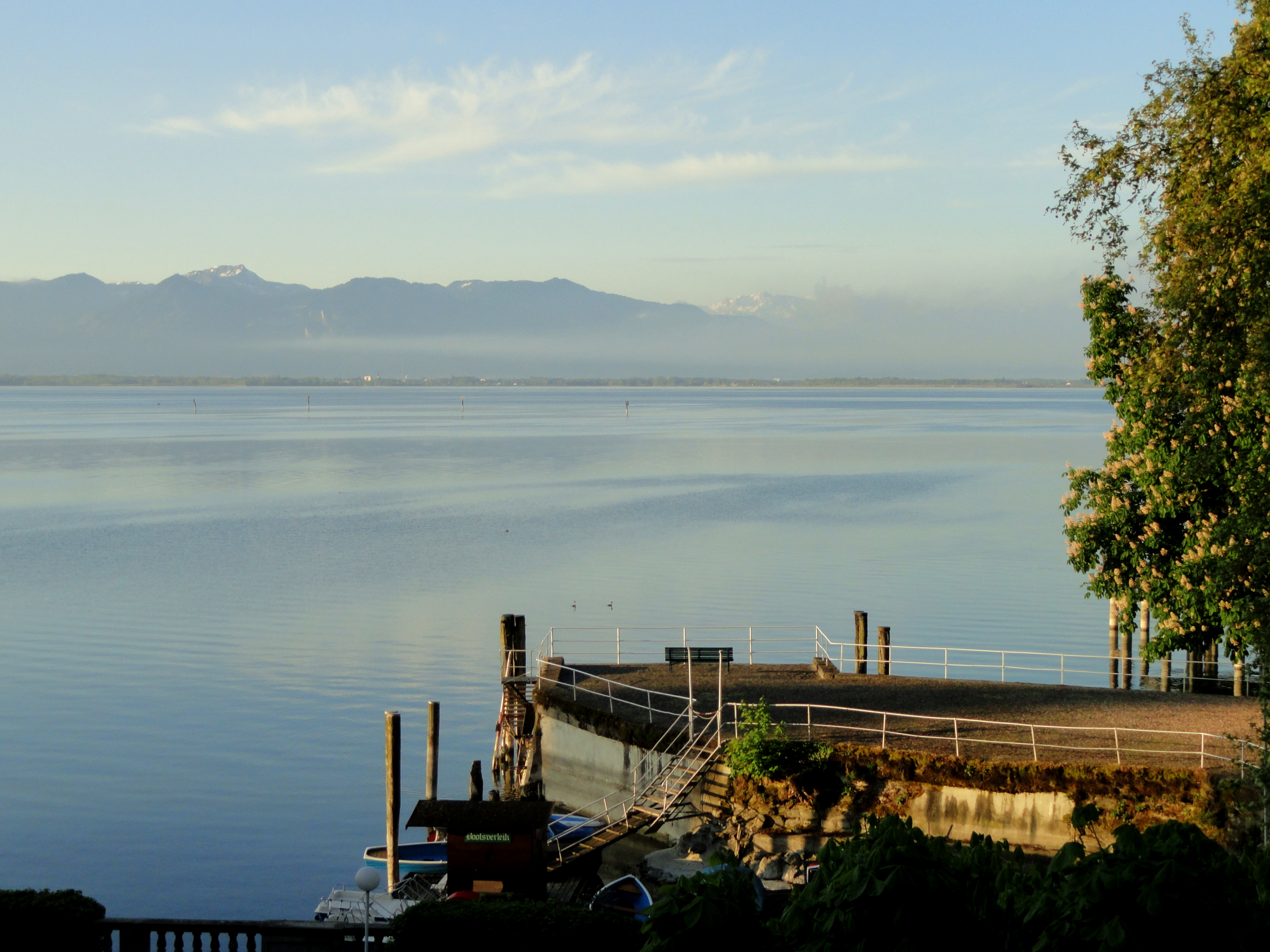 Bodensee at Bad Schachen, Lindau, Germany.